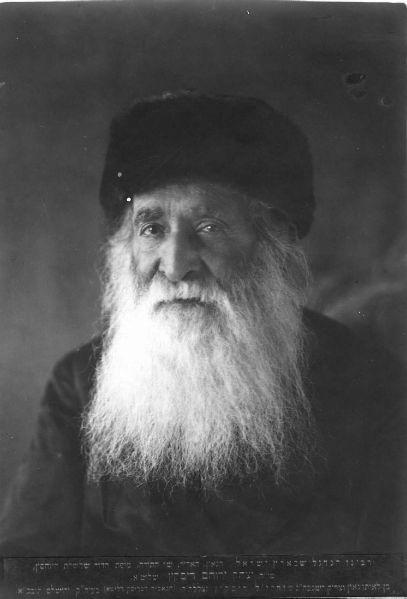 יצחק ירוחם דיסקין